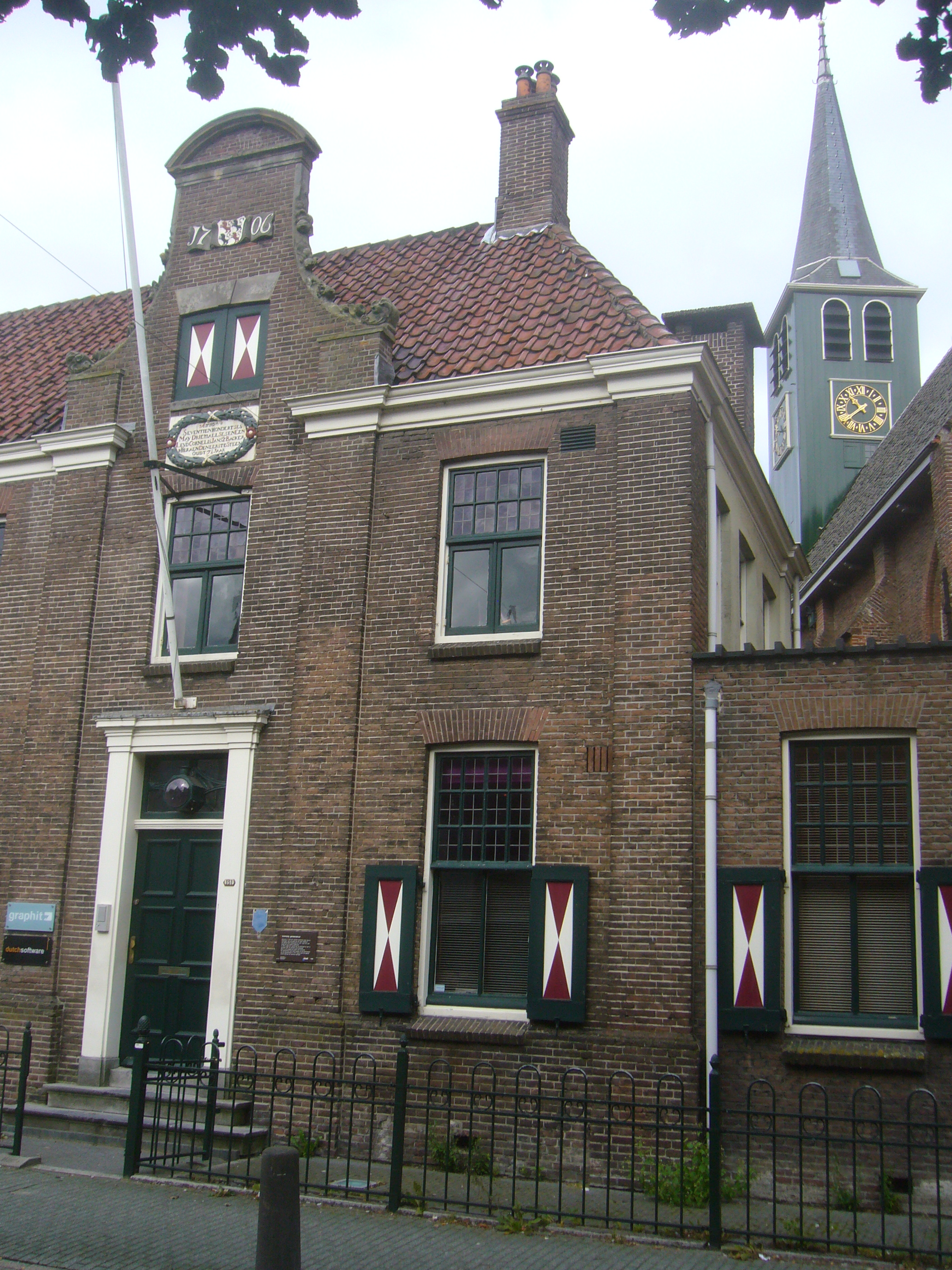 Voormalig gemeentehuis gebouwd in 1706